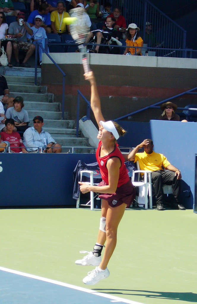 2009 US Open